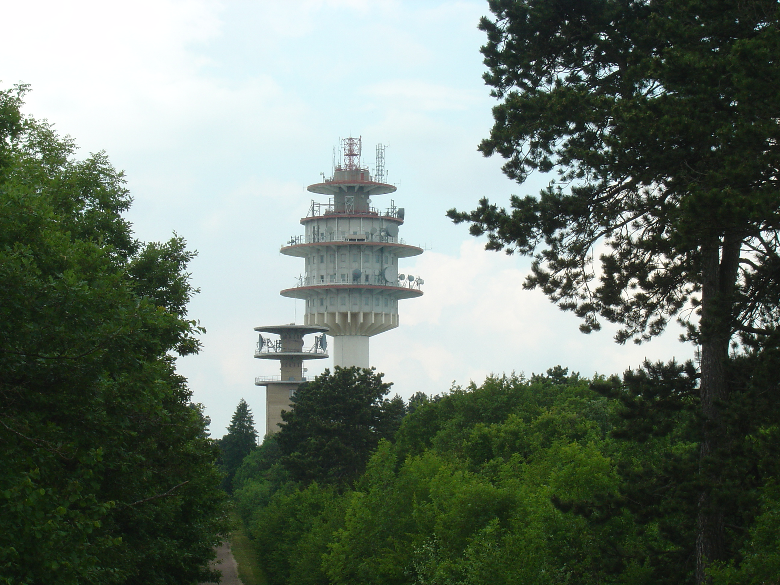 Relais hertzien du Mont Afrique (Bourgogne, 21)